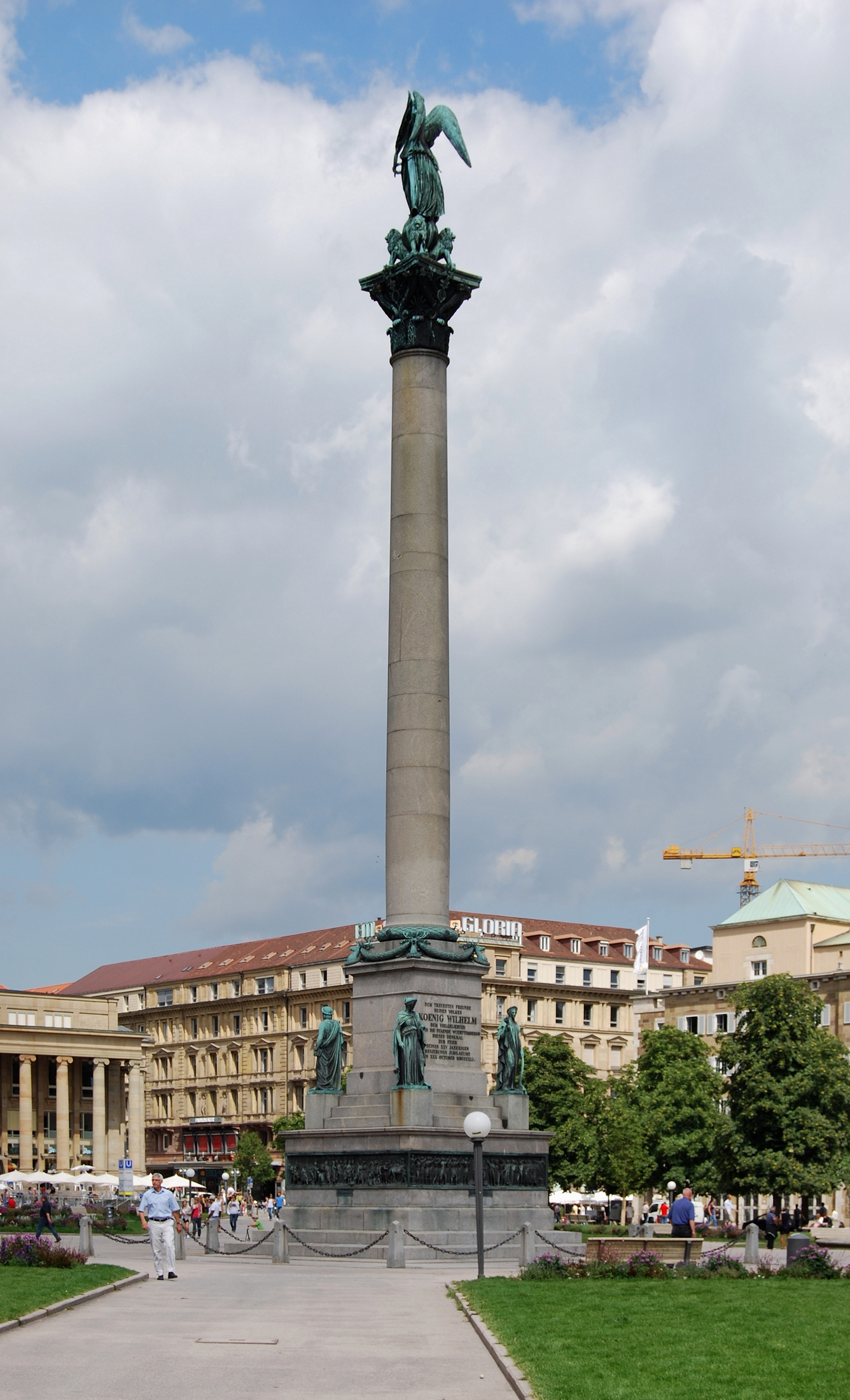 Die Jubiläumssäule auf dem Schloßplatz in Stuttgart, Baden-Württemberg.